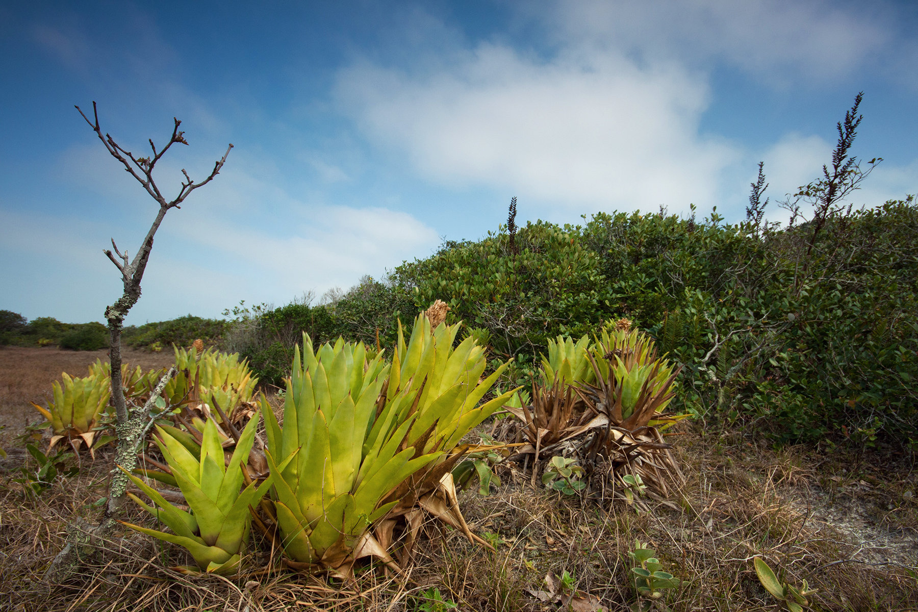 Paisagem de restinga, bromélias Aechmea